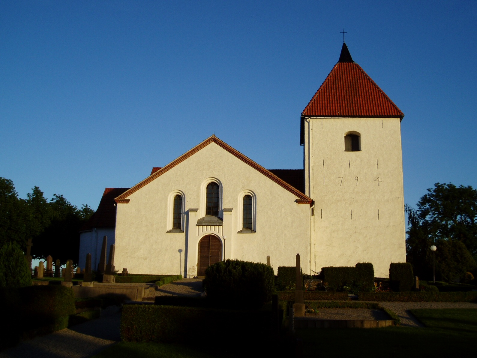 Östra Strö kyrka, Eslöv kommun, Skåne